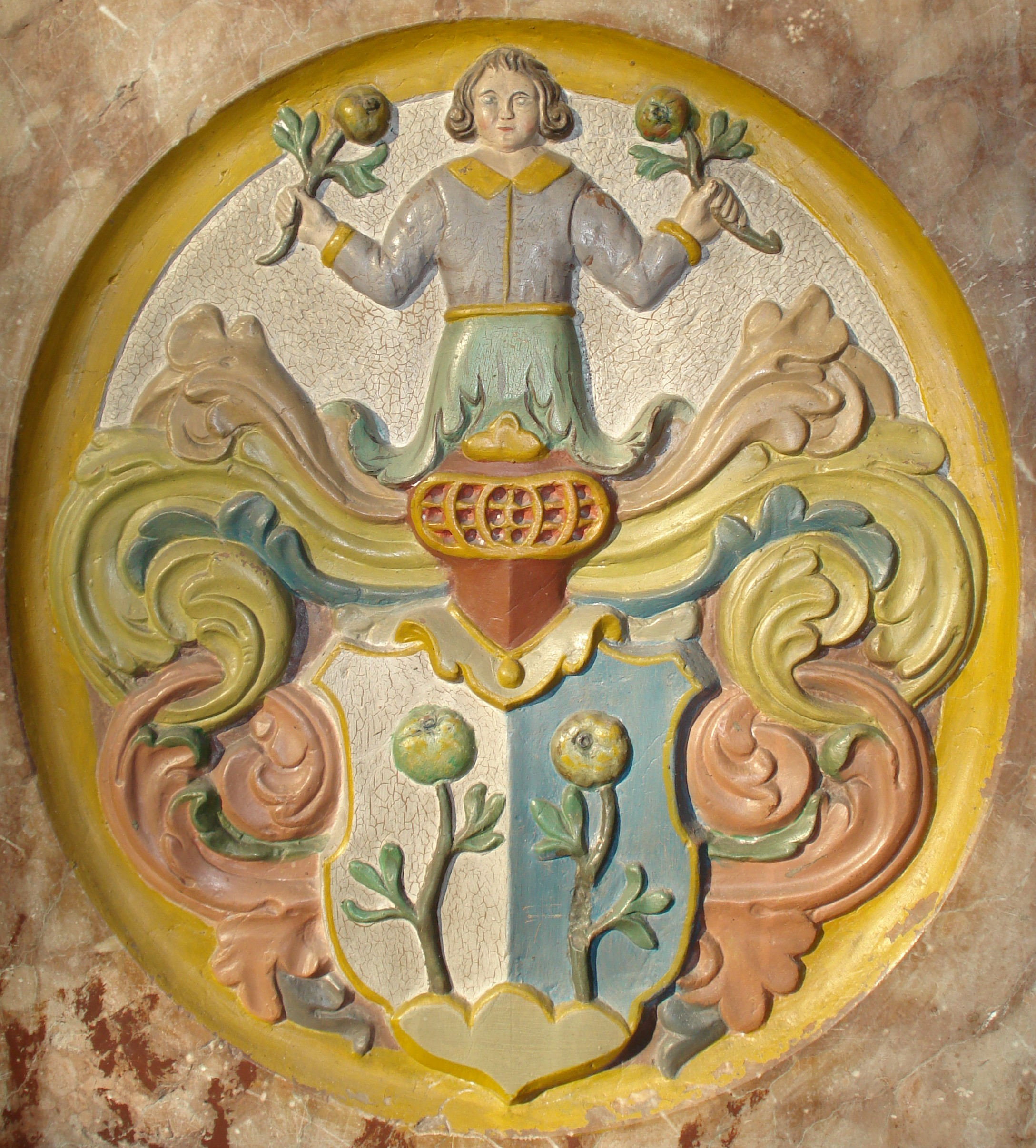 Wappen der Patrizierfamilie Holzapfel in einem Epitaph in der Kirche St. Nikolaus in Kleinkötz